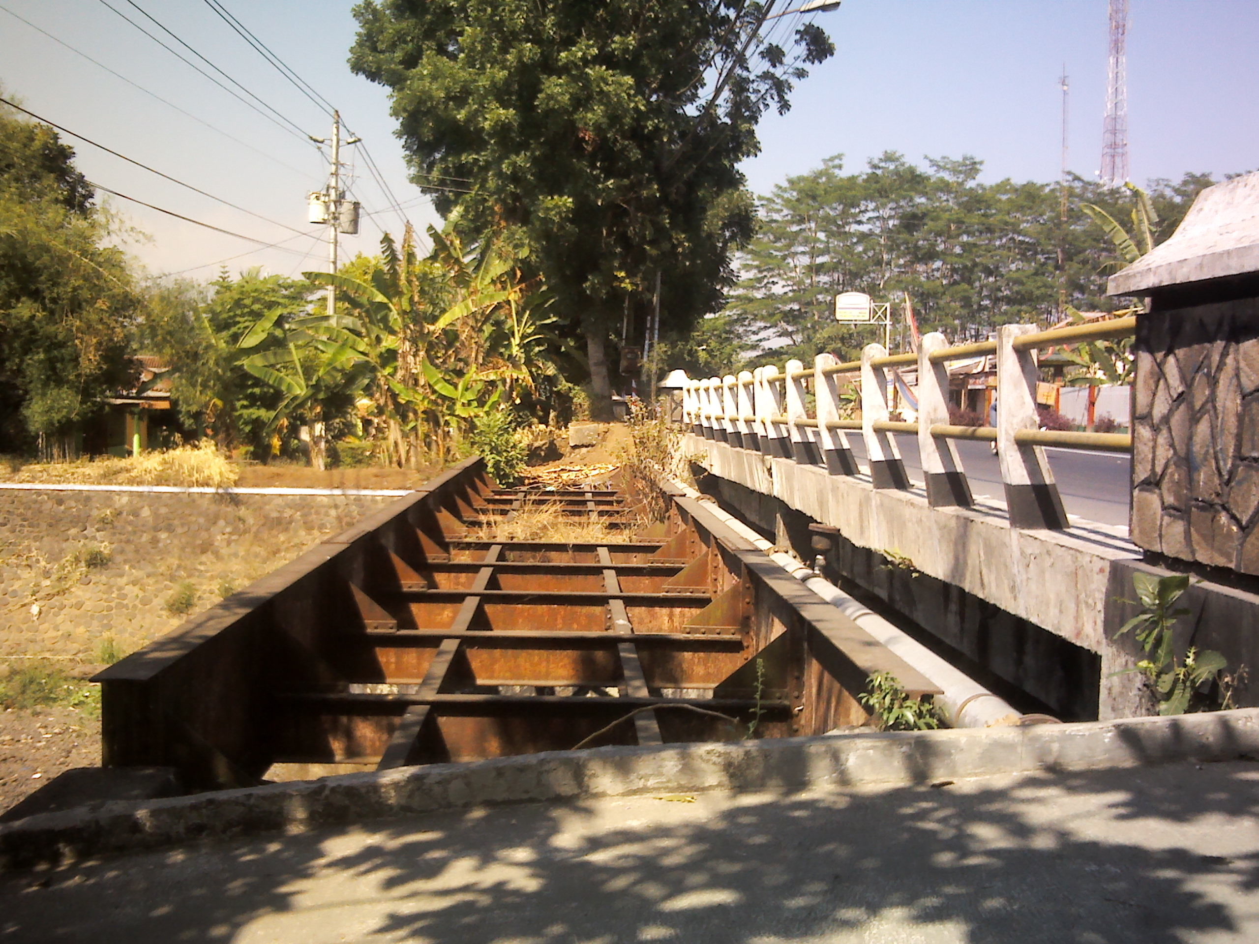 Jalur Rel Serajoedal Stoomtram Maatschappij